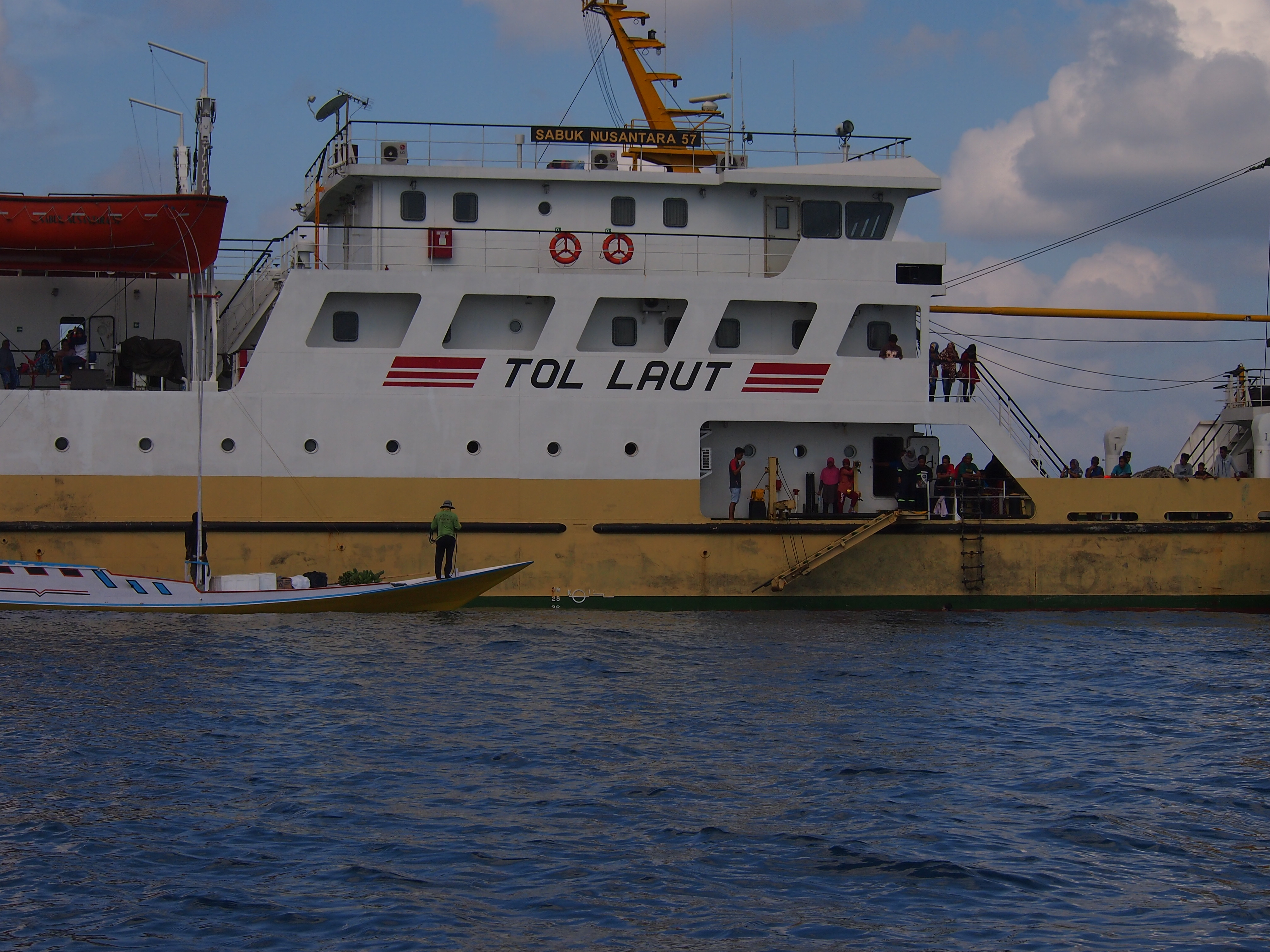 KM Sabuk Nusantara 57 sedang berlabuh menunggu penumpang naik kapal